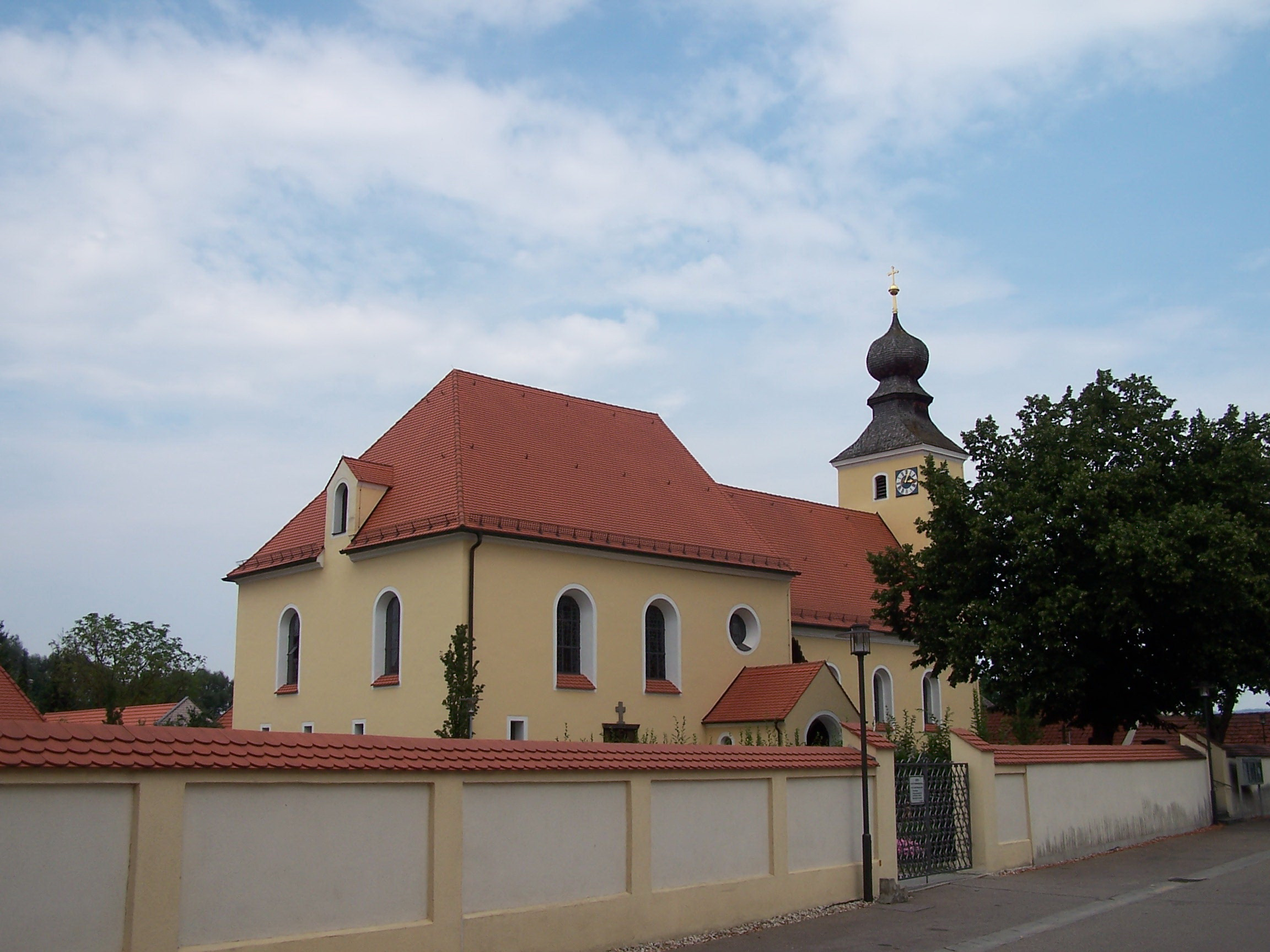 Barbing, Kirchstraße 22. Katholische Pfarrkirche St. Martin, Chorturmkirche mit Vorzeichen, Turm gotisch, Langhaus 1733, Erweiterung 1935/36; Friedhofsmauer, Bruchstein, 17./18. Jahrhundert. Ansicht von Südwesten.